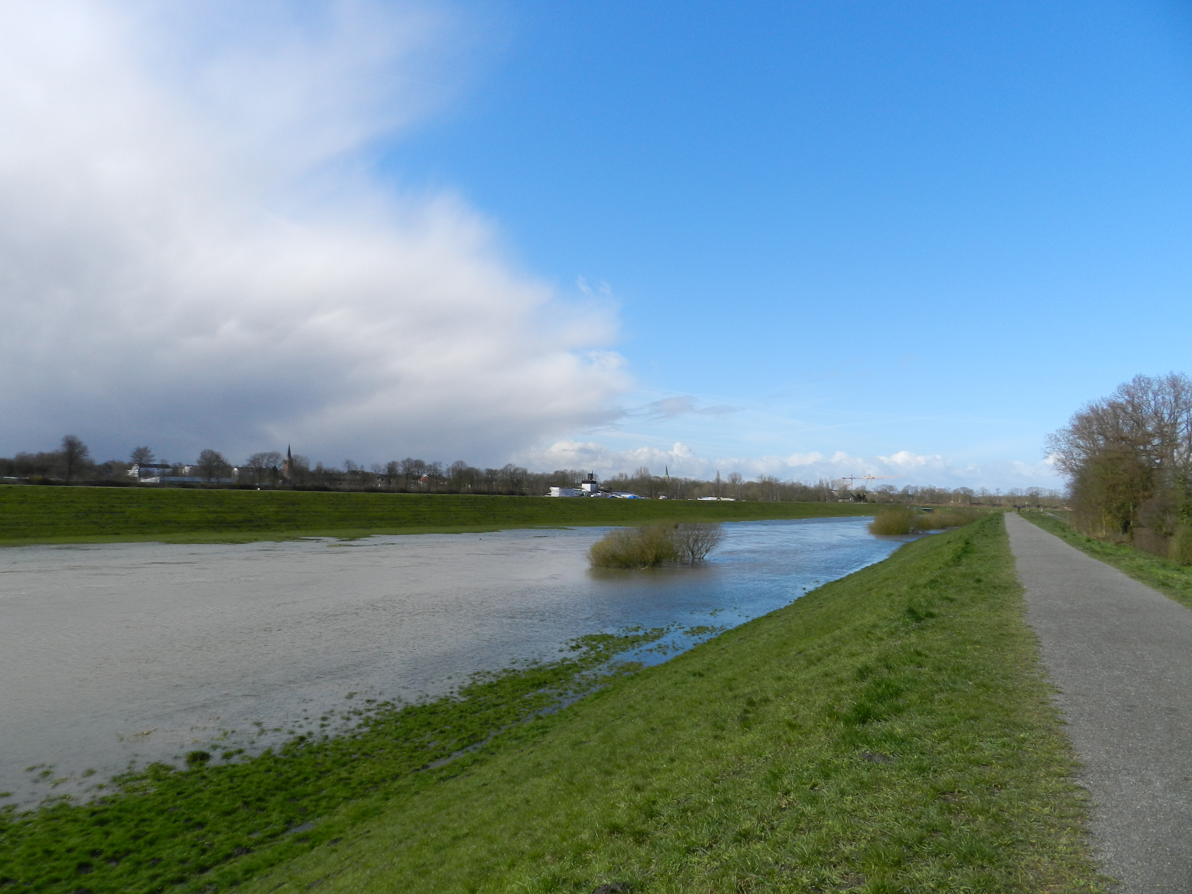 Leicht erhöhter Wasserpegel der Lippe nach Sturm Niklas im April 2014, Dorsten, Ortstteil Hervest, Nordrhein-Westfalen